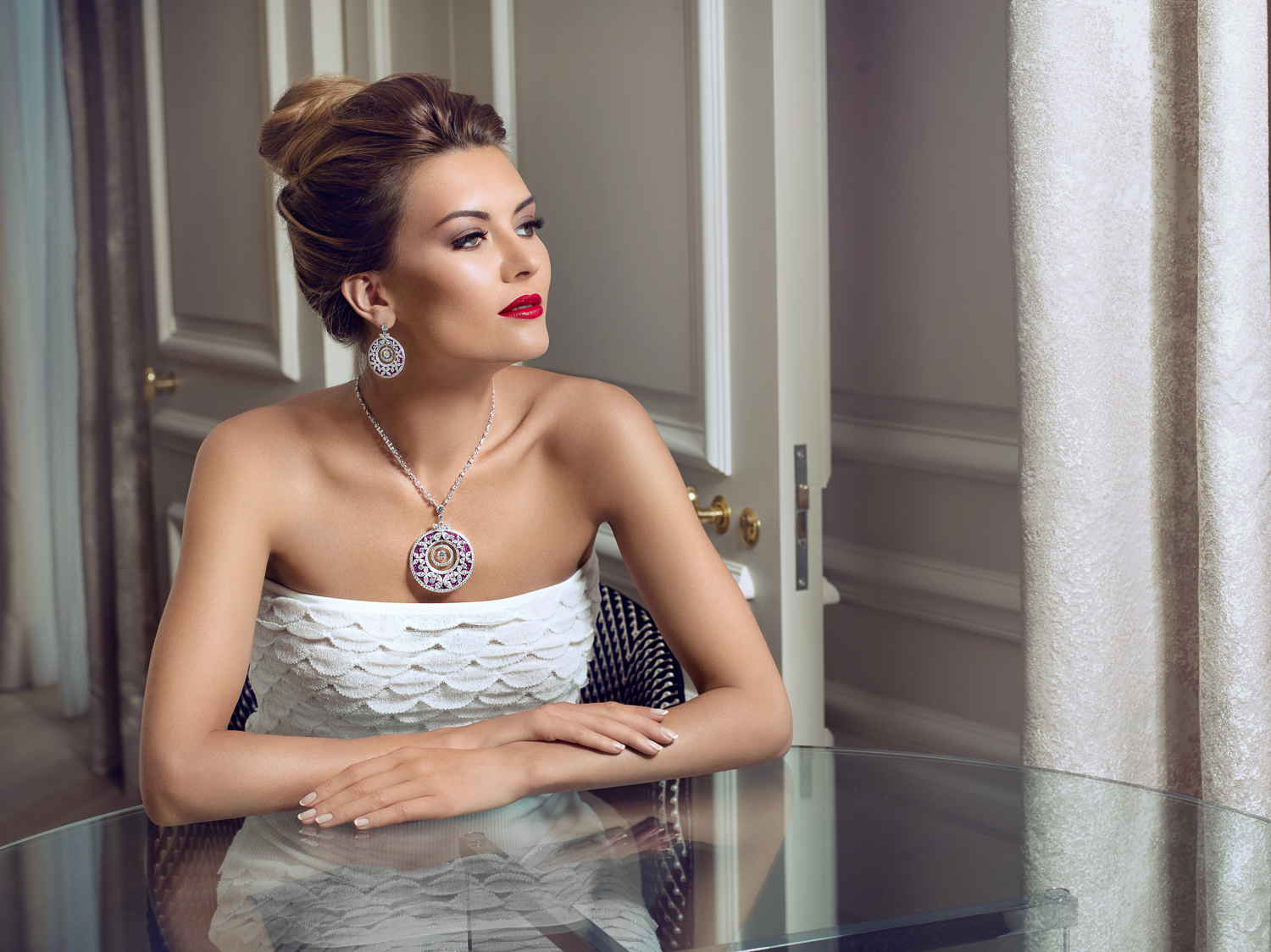 Haute Joaillerie Graff Diamonds photographiée par Gil Zetbase à Monaco